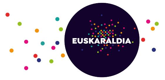 Euskaraldia egitasmoko logoa